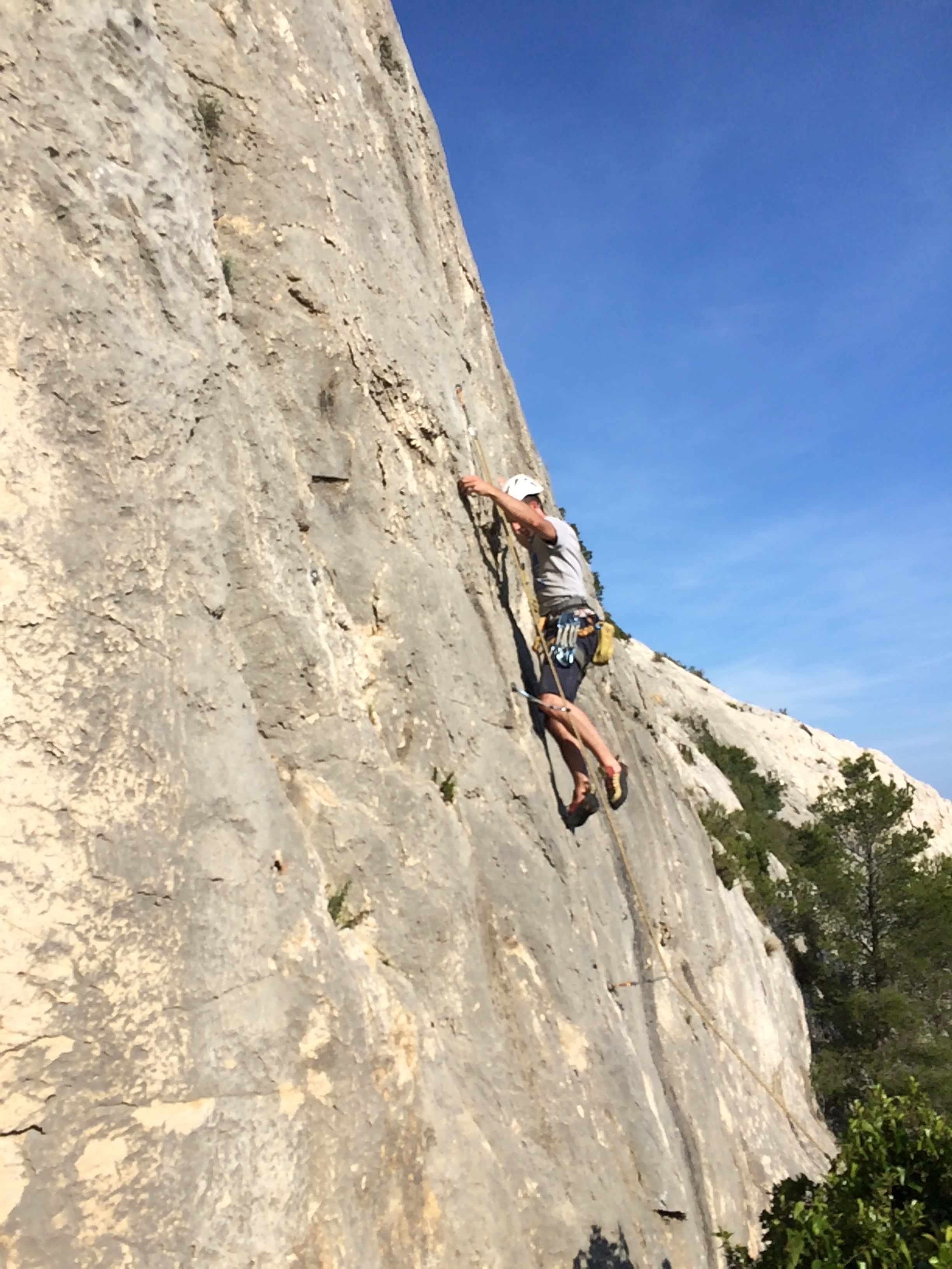 Escalade en dalle, secteur Roche Percée (Morgiou) dans les Calanques de Marseille. Voie Om Mani Padme Om 5c.